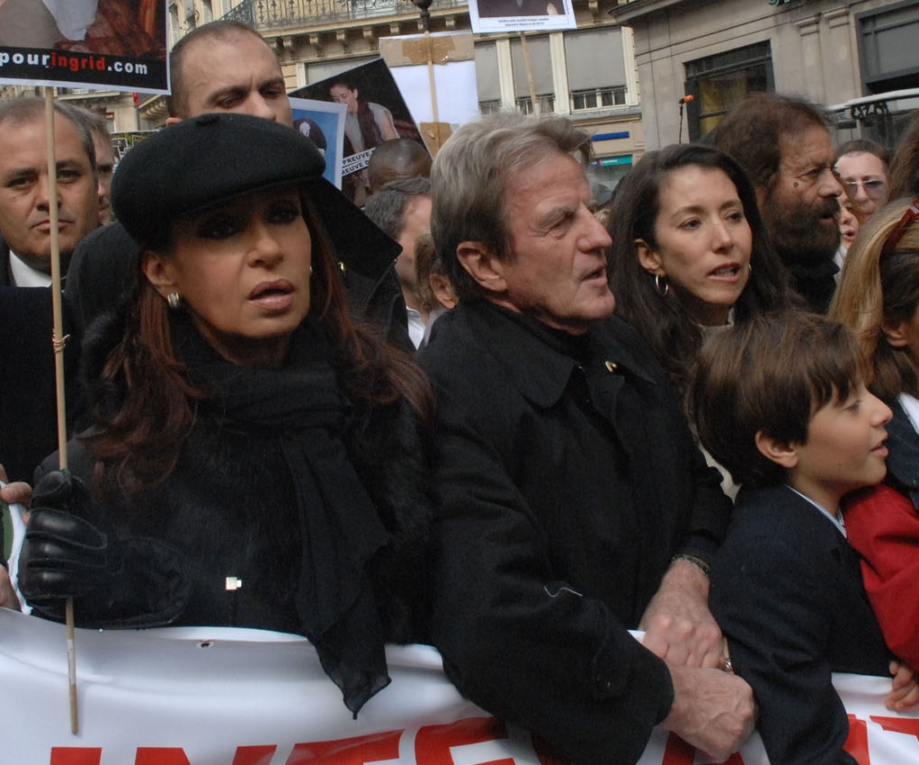 Marcha por la liberación de Íngrid Betancourt, en la foto Cristina Fernández (presidenta de Argentina), Astrid Betancourt (hermana de Íngrid) y Lorenzo Delloy (Hijo de I. Betancourt).